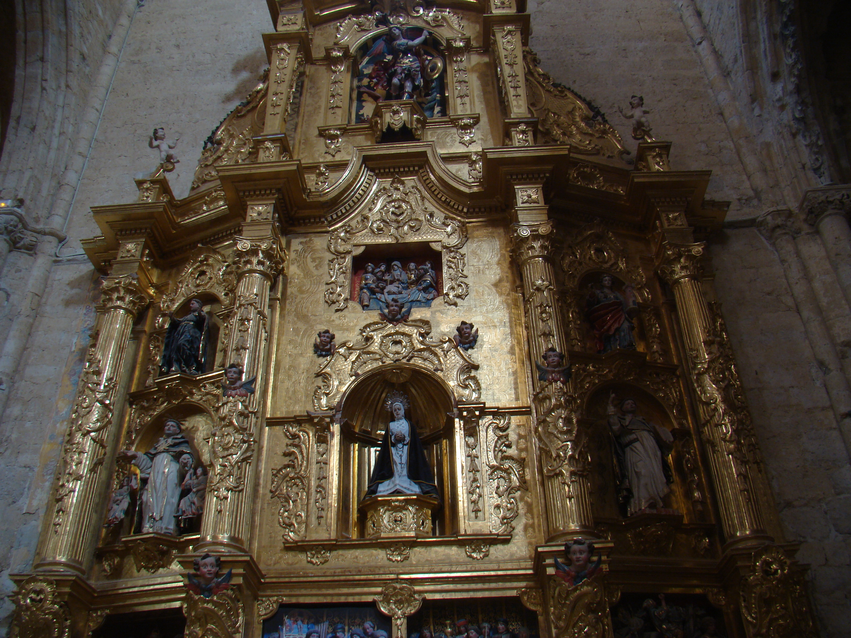 Iglesia de San Hipólito en Támara de Campos (Palencia, España). Retablo rococó de Nuestra Señora de la Soledad, obra de Francisco Tejedor, año 1765. Situado en la nave del Evangelio.